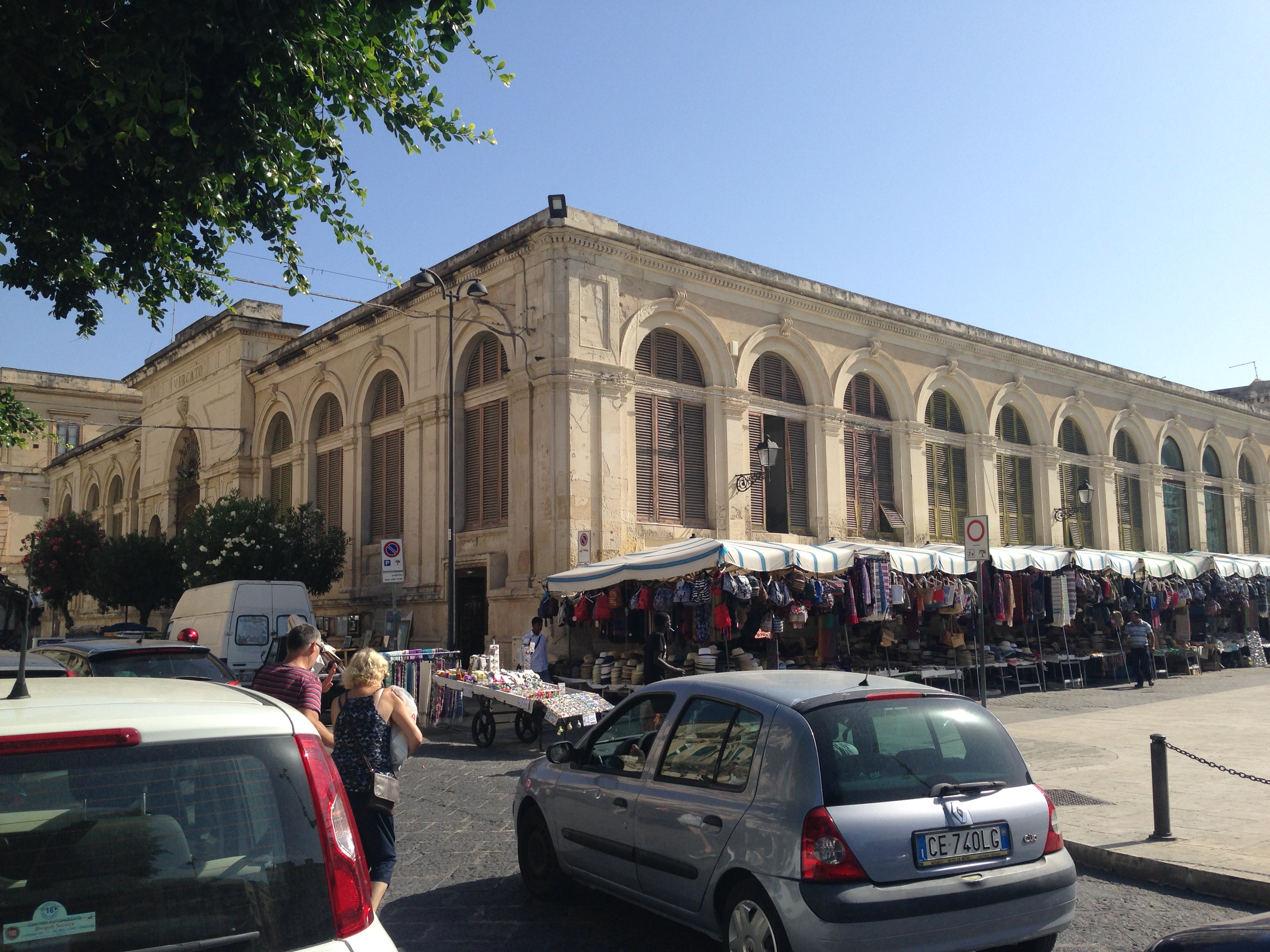 Antico mercato This is a photo of a monument which is part of cultural heritage of Italy.